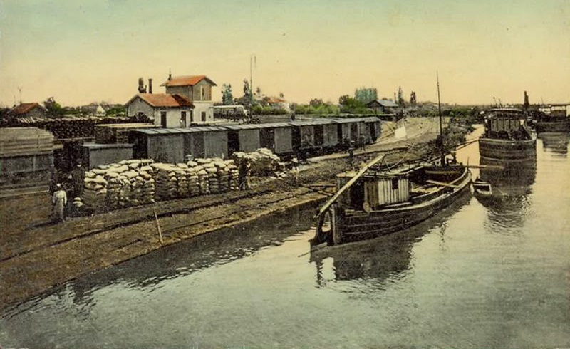 Sava-Hafen in Bosanski Brod